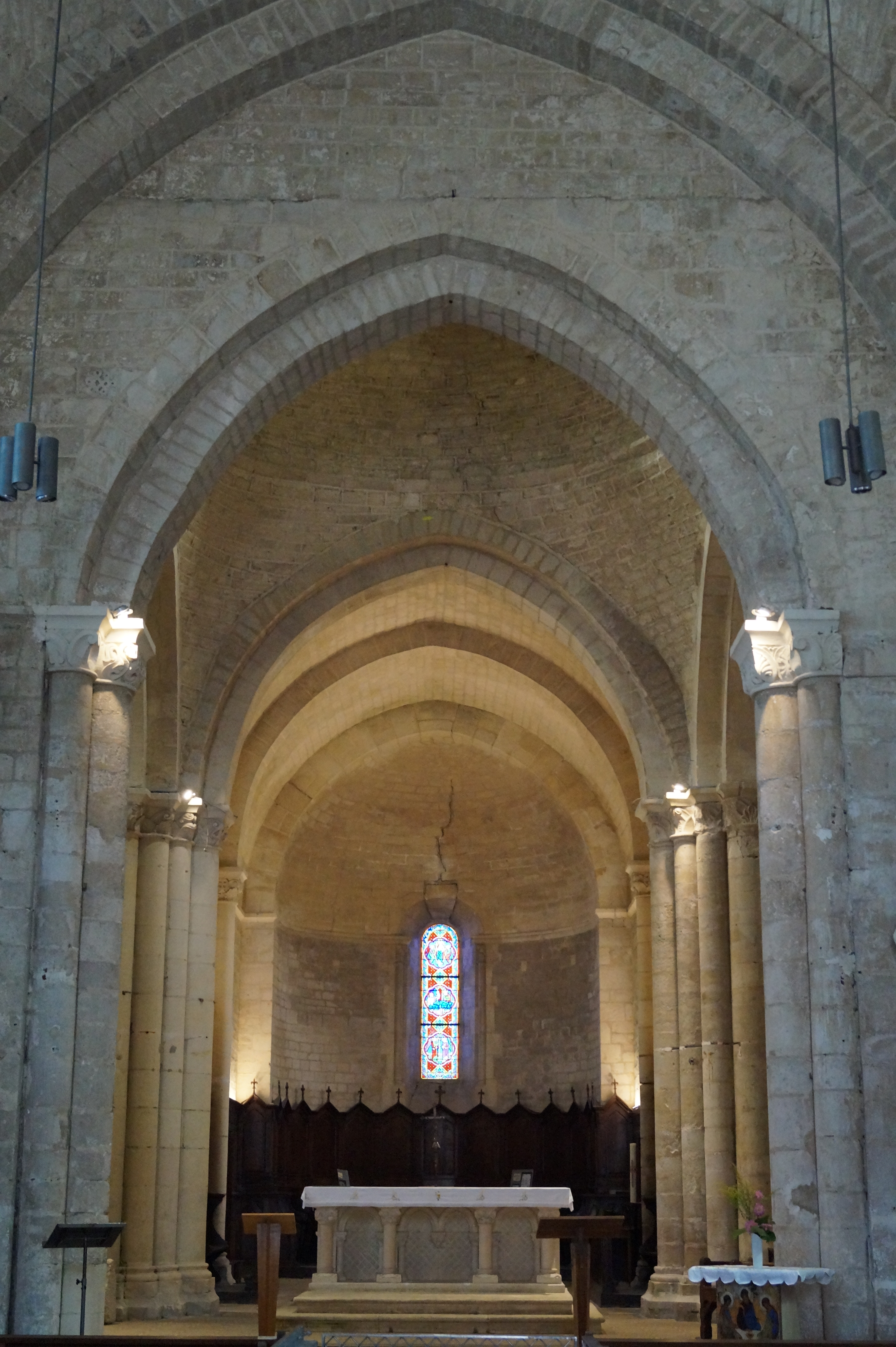 Le prolongement de la nef de l’église Notre-Dame-des-Anges.